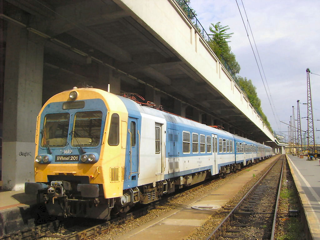 A MÁV BVhmot motorvonata Budapest-Nyugati Pályaudvaron.